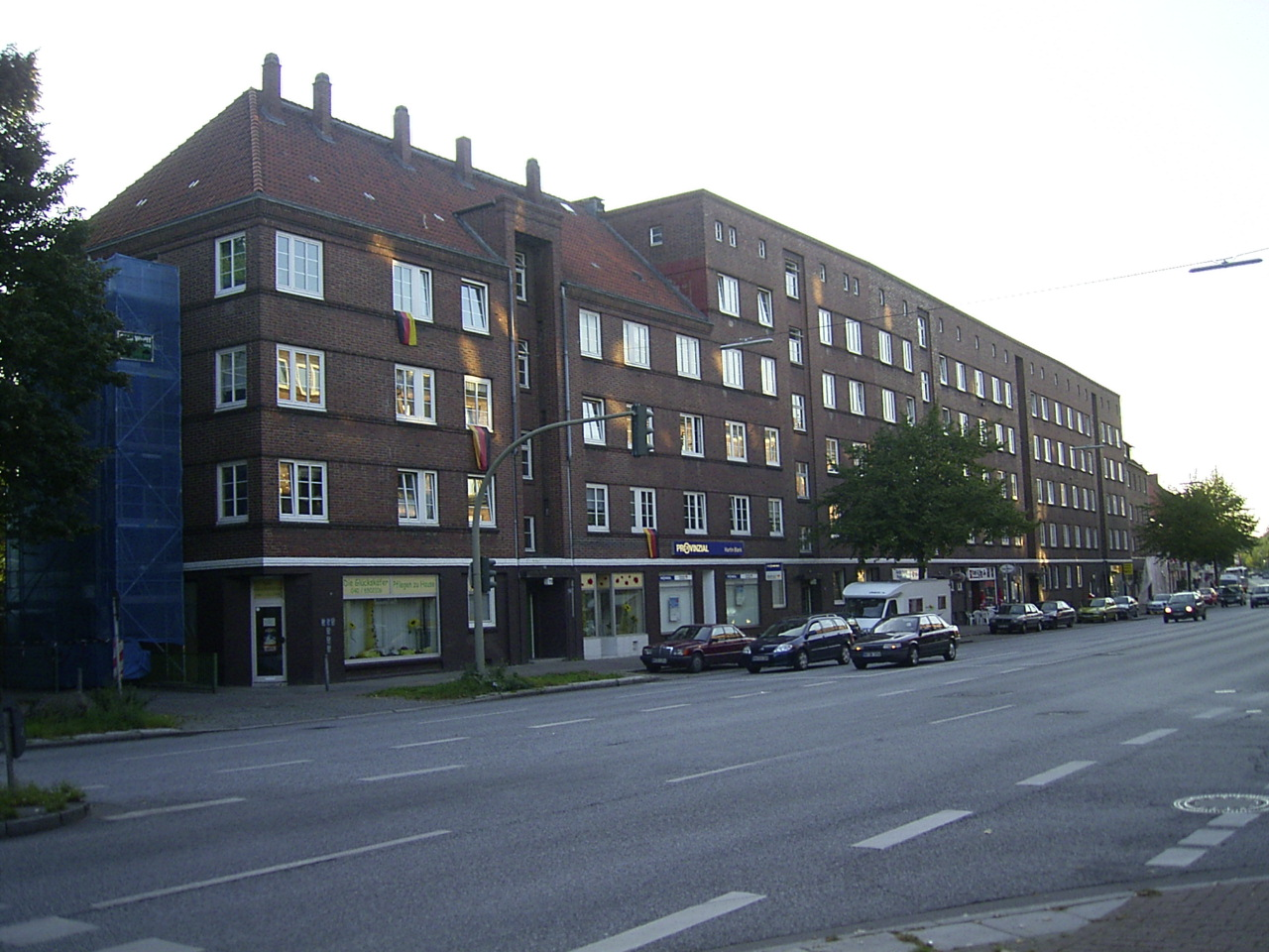 Backsteinbauten an der Horner Landstraße in Horn